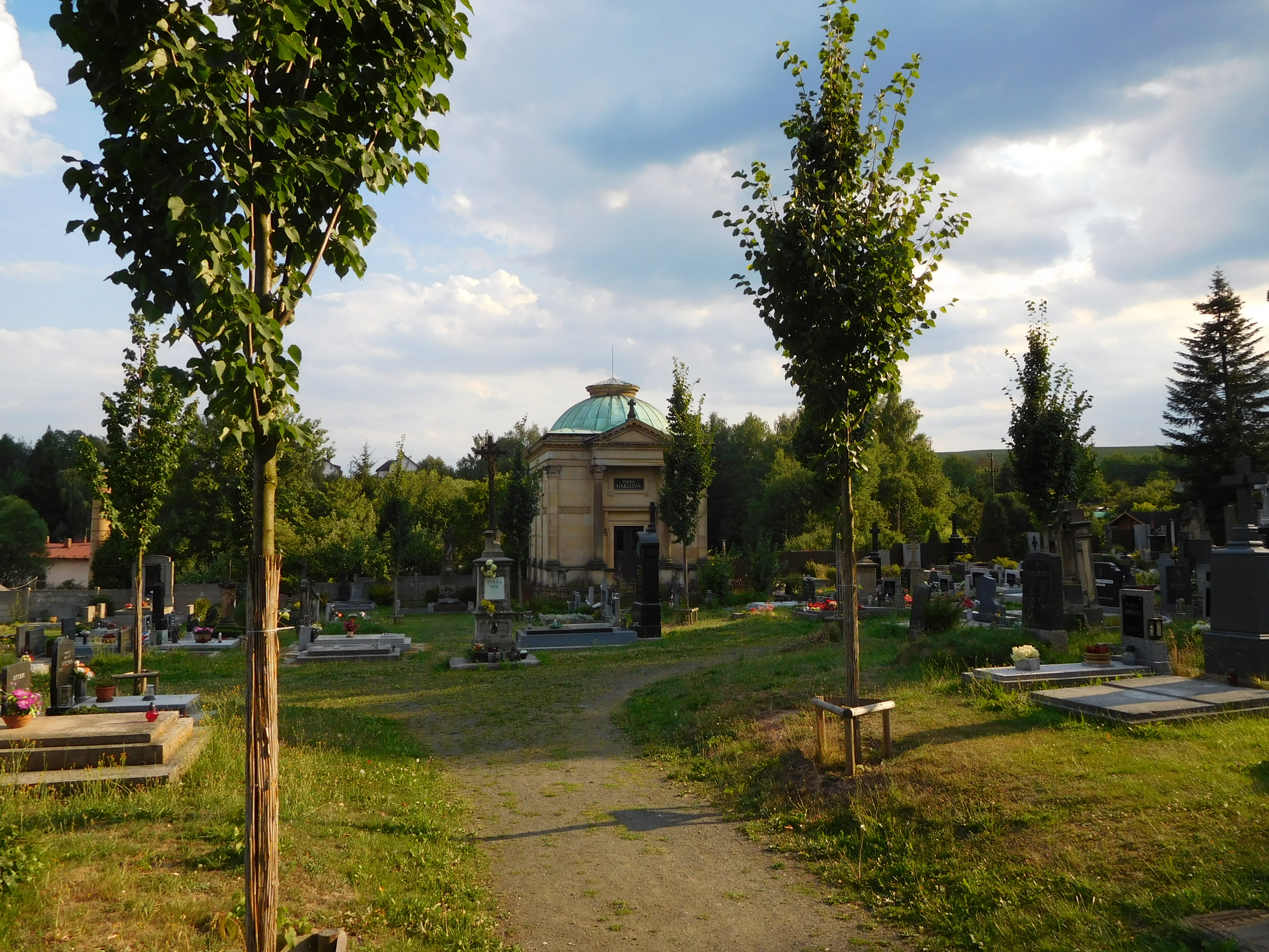 Jilemnice - hřbitov